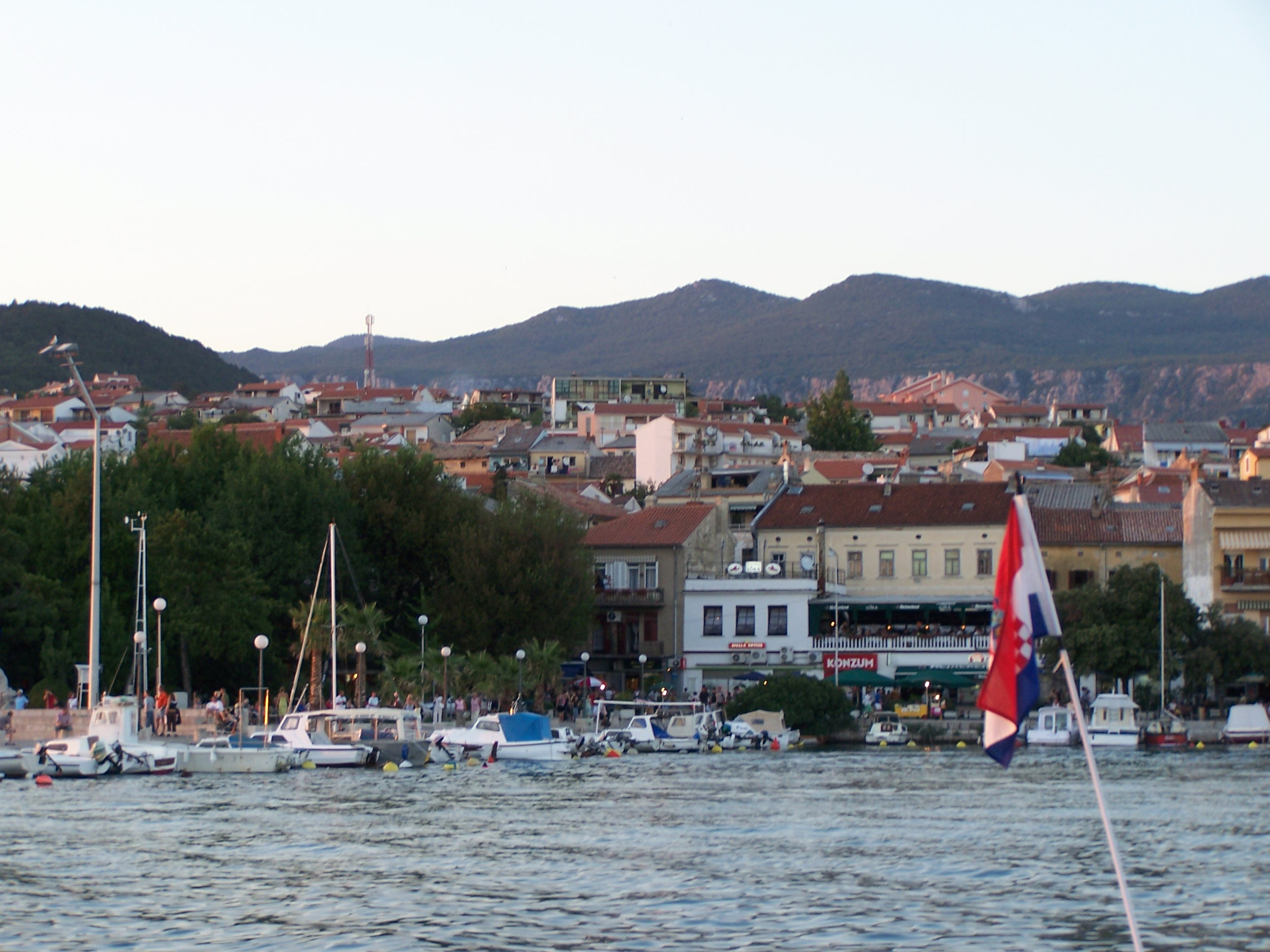 Crikvenica, Chorwacja - widok od strony portu. Photo by Kuba Cieślakiewicz